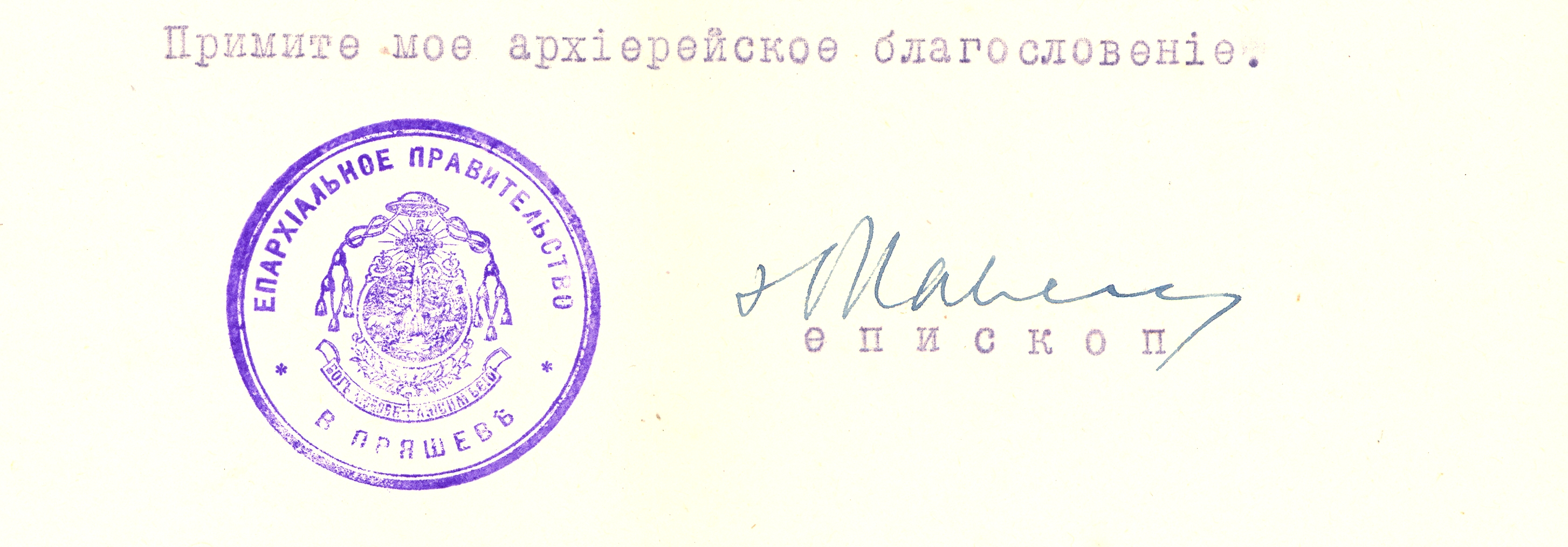 Павло Петро Гойдич властноручно в 1947 році. Document scanned by Jozafát Vladimír Timkovič, OSBM